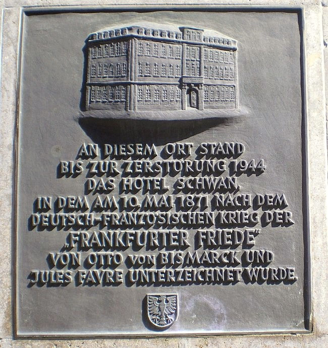 Gedenktafel an das Hotel zum Schwan in Frankfurt am Main, in dem am 10. Mai 1871 der "Friede von Frankfurt" unterzeichnet worden ist. Ort der Tafel: Steinweg 12, Frankfurt am Main